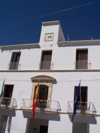 Ayuntamiento de Estepa (provincia de Sevilla, Andalucía).